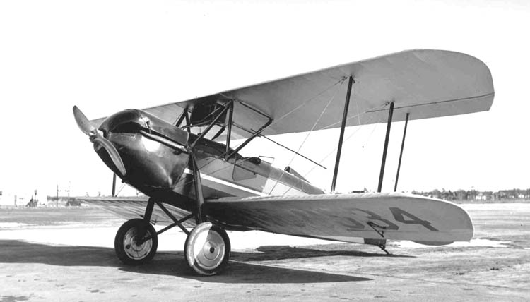 San Francisco Bay Airdrome, Alameda, California 1937.